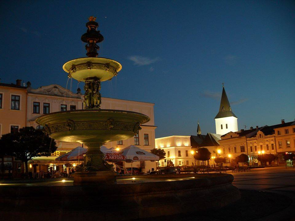 Piastovský zámek - pohled z náměstí